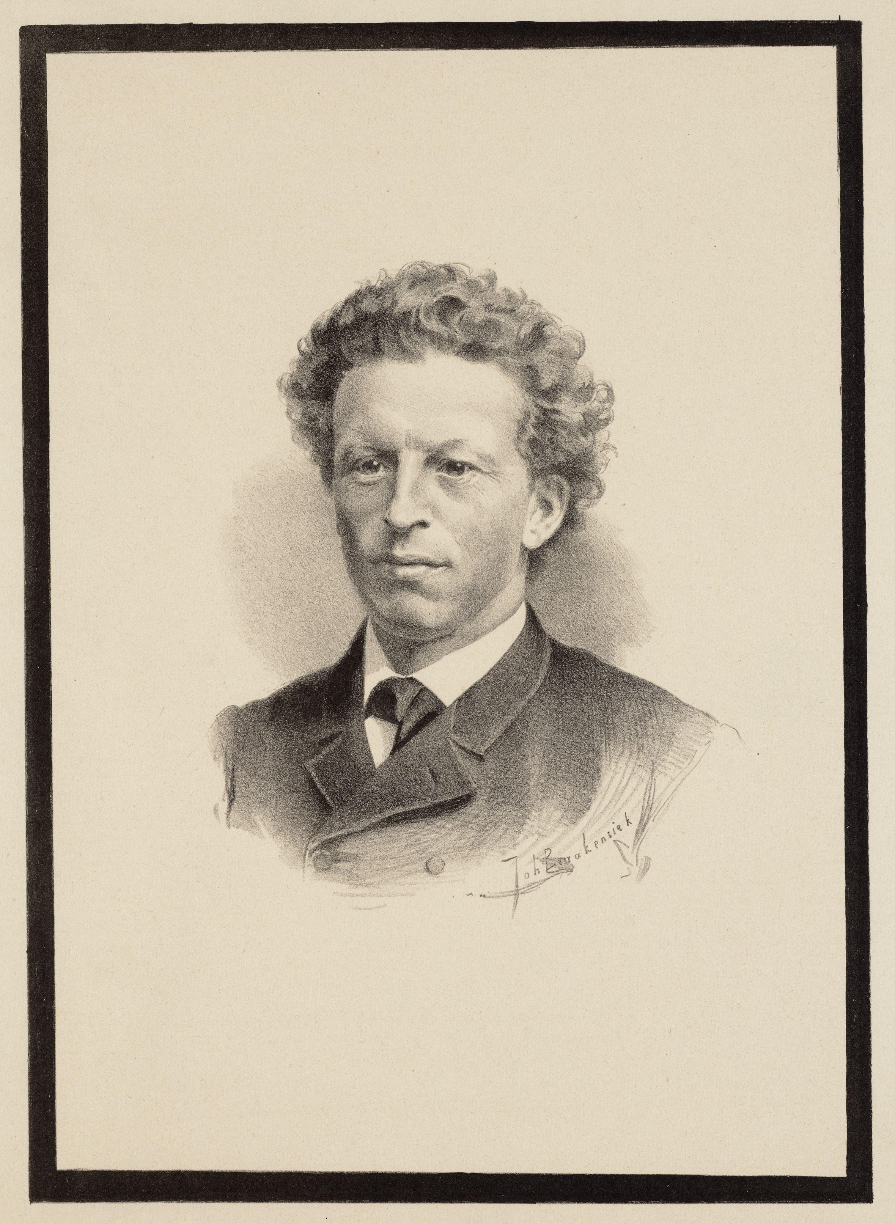 Beschrijving Tjomme van Holkema (09-12-1843 / 04-01-1891) Uitgever-directeur van Scheltema en Van Holkema. Later oprichter van Van Holkema en Warendorf Uitgevers Maatschappij te Amsterdam. Portret, verschenen naar aanleiding van zijn overlijden. Afmetingen: 234 x 336 mm. Documenttype prent Vervaardiger Braakensiek, J.C. (Johan Coenraad, 1858-1940) Collectie Collectie Stadsarchief Amsterdam: tekeningen en prenten Datering 1891 Geportretteerde Holkema, Tjomme van Inventarissen Afbeeldingsbestand 010097014396